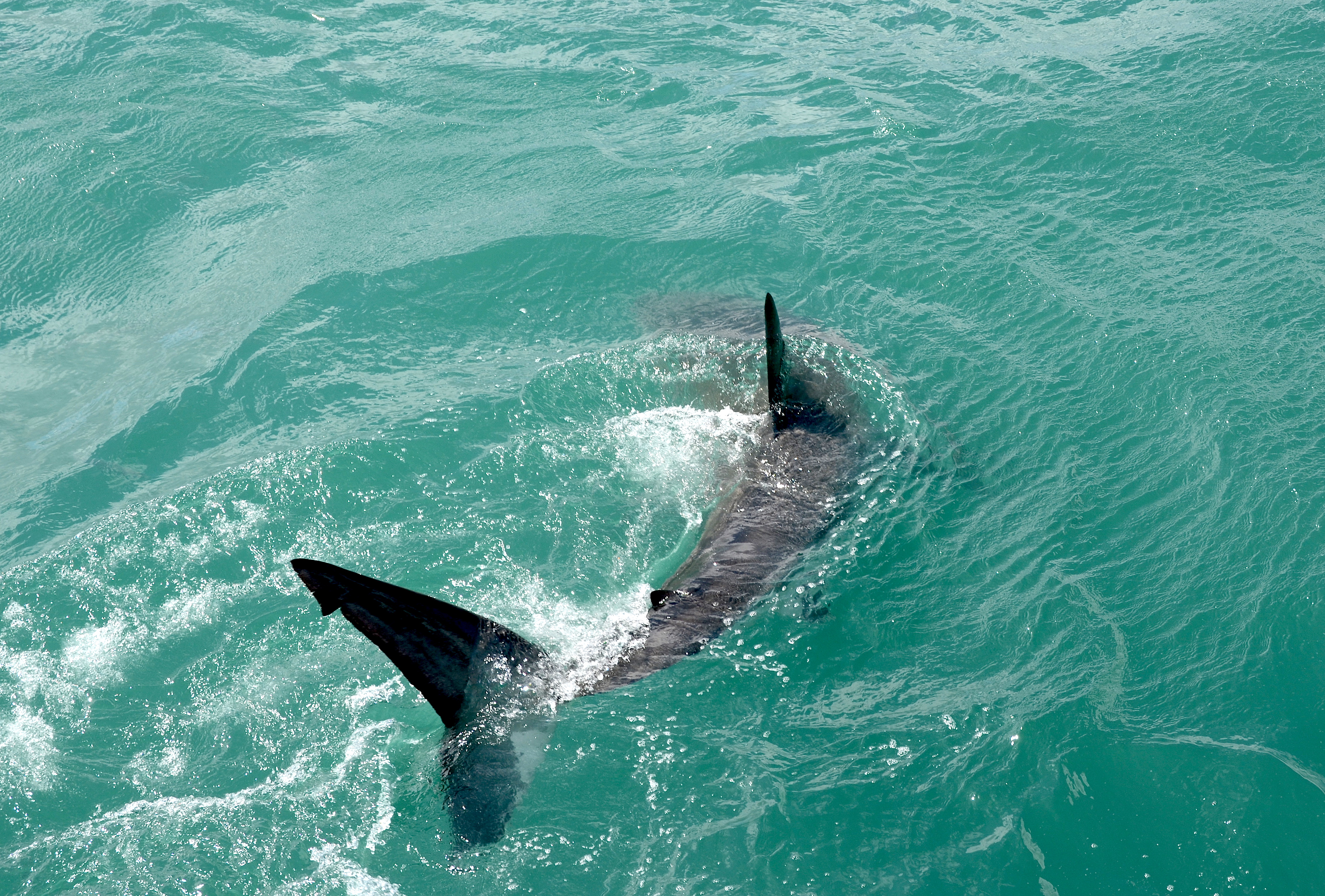 Weißer Hai bei Gansbaai in Südafrika